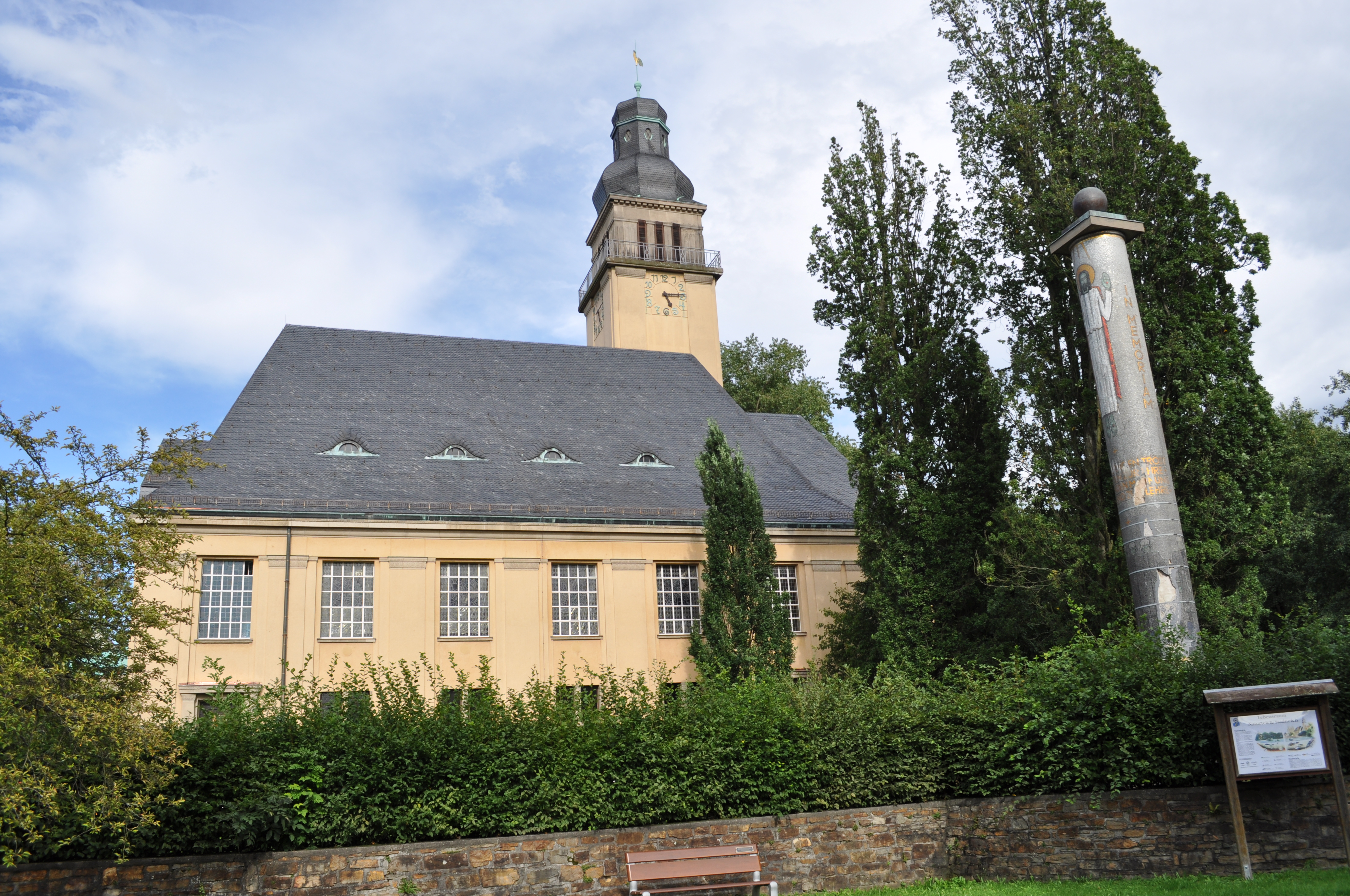 Evangelische Christuskirche in Oberursel, Seitenansicht